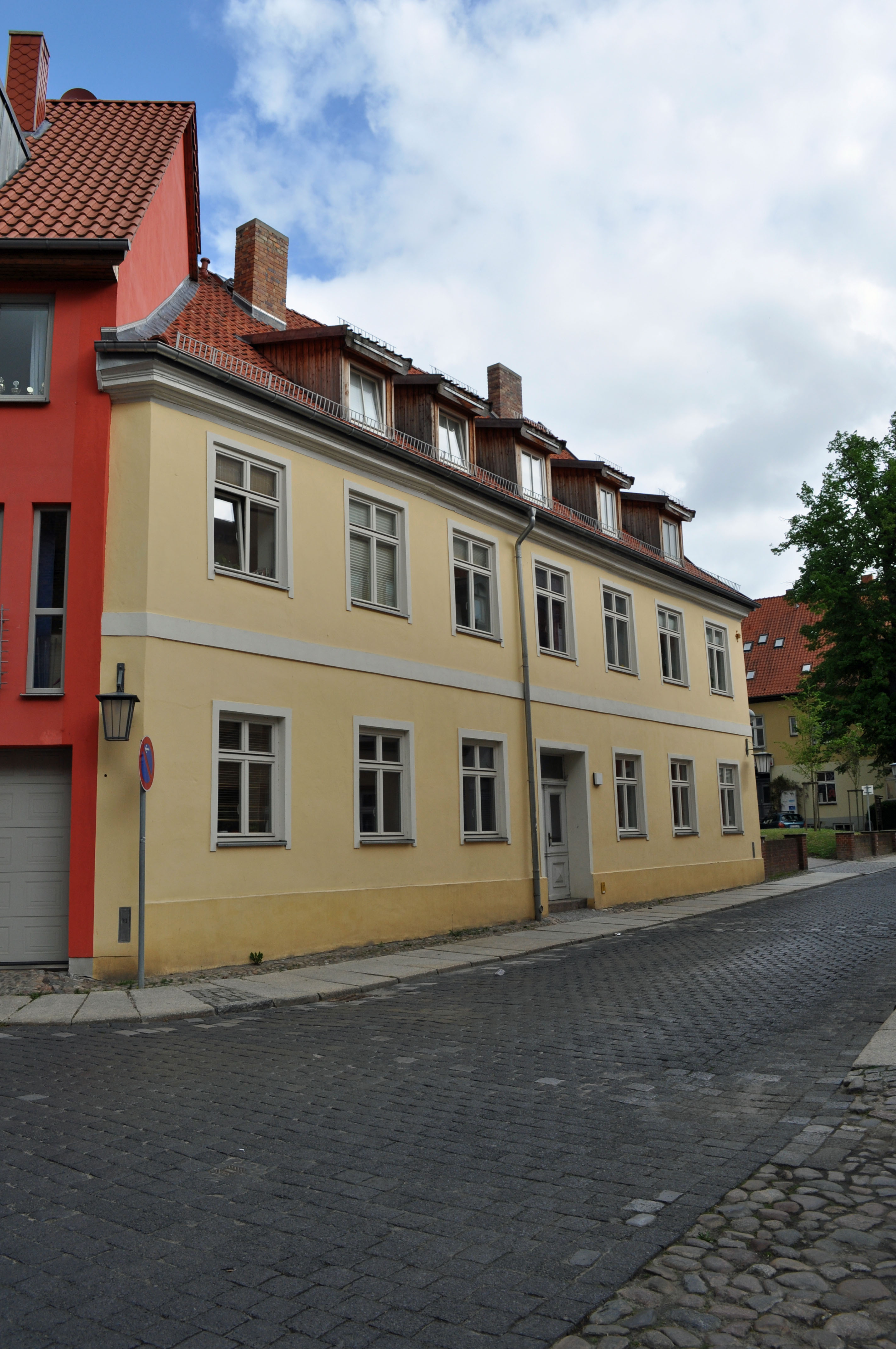 Gebäude in Stralsund, siehe Dateiname